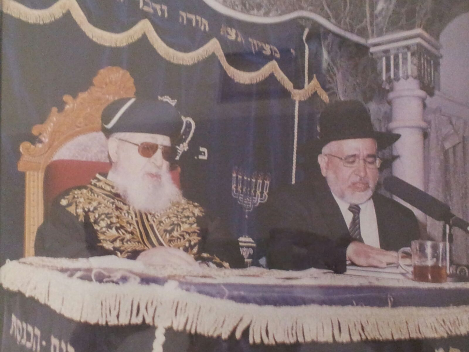 שנת תשס"ב